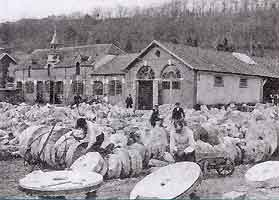 meules